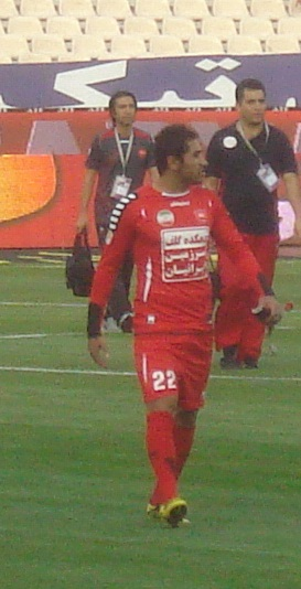 Mehrzad Madanchi, Persepolis-Malavan match, 2012-13 Iran Pro League